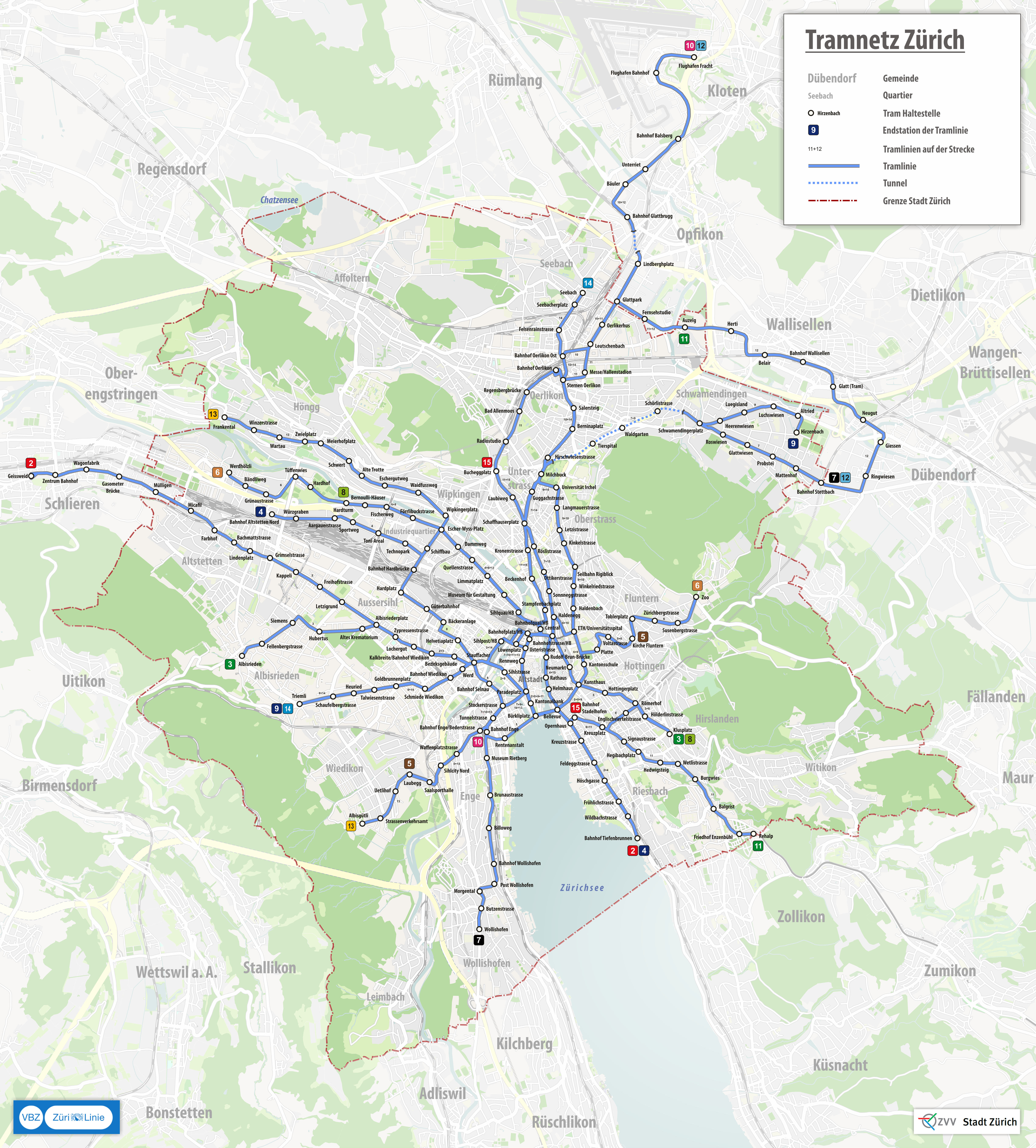 Tramnetz der Verkehrsbetriebe Zürich (VBZ), ab 25. November 2019